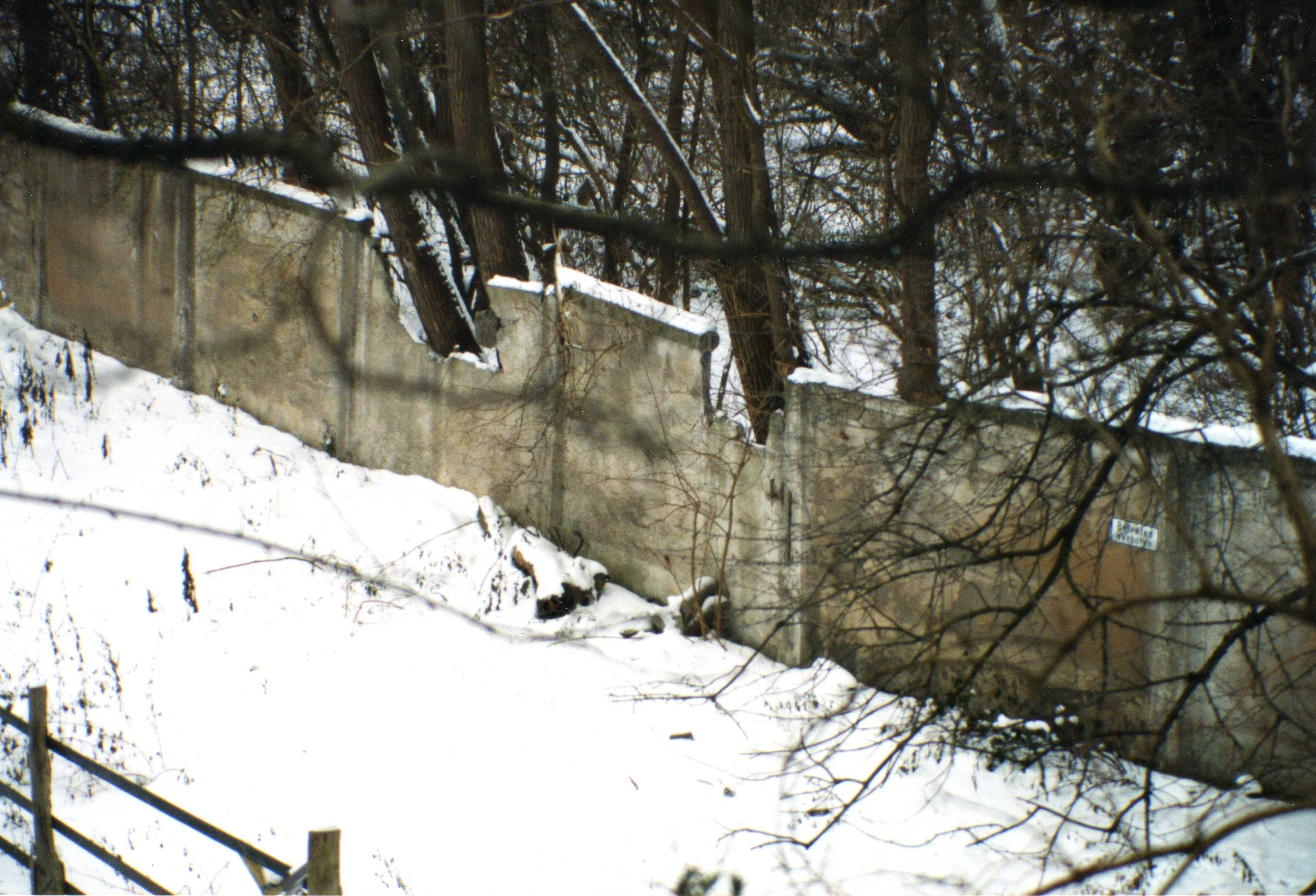 Betonmauer aus der Entstehungszeit des ehem. AW Jülich (Bundesbahn-Ausbesserungswerk) in Höhe der früheren Gleisharfe zur Wagenhalle, fotografiert von der Landstraßen-Brücke aus.